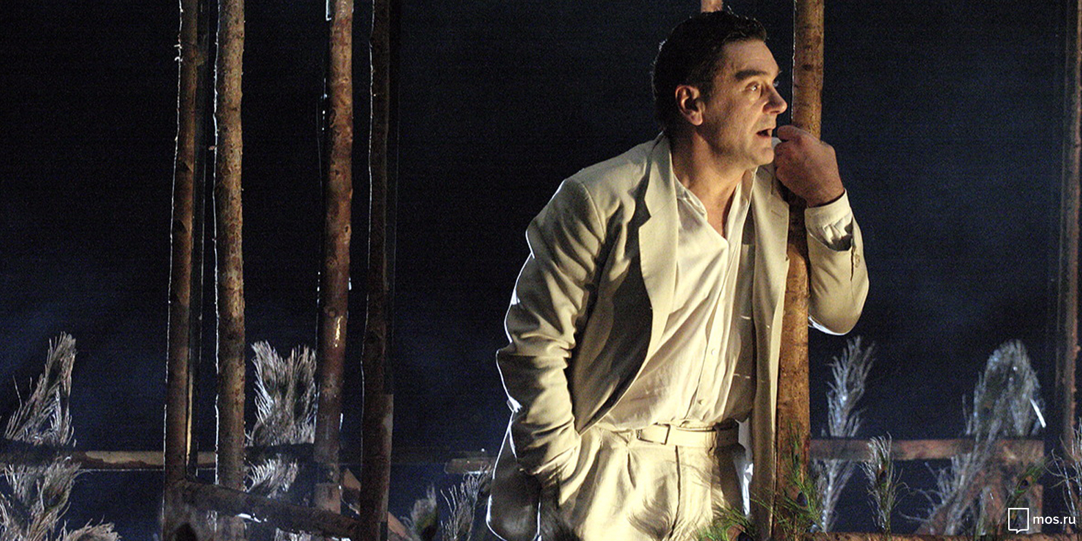 Спектакль «Чёрный монах» в МТЮЗе, 2016 год